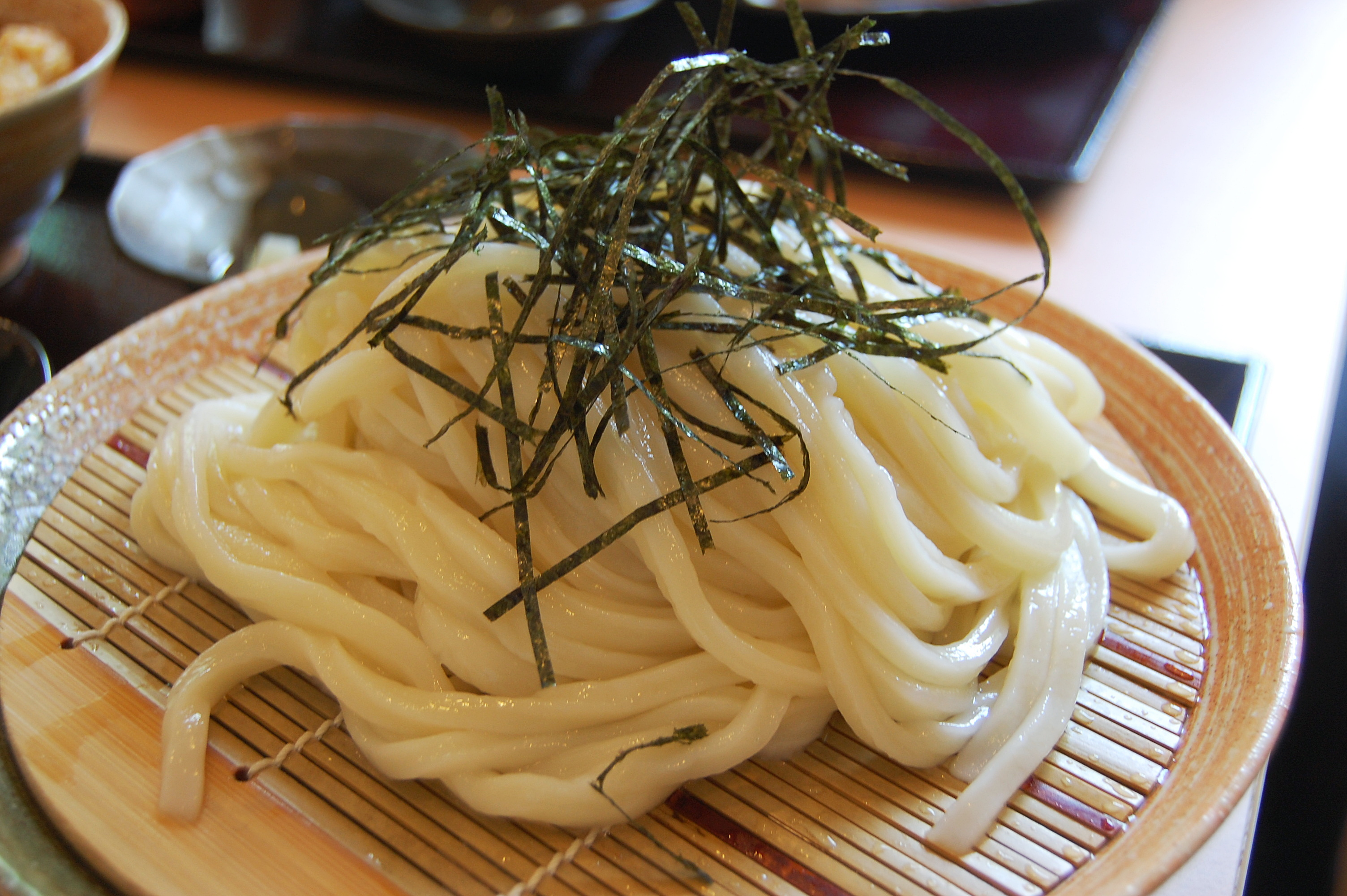 Zaru Udon at Butsuwo No Udon, Utsunomiya, Tochigi Prefecture